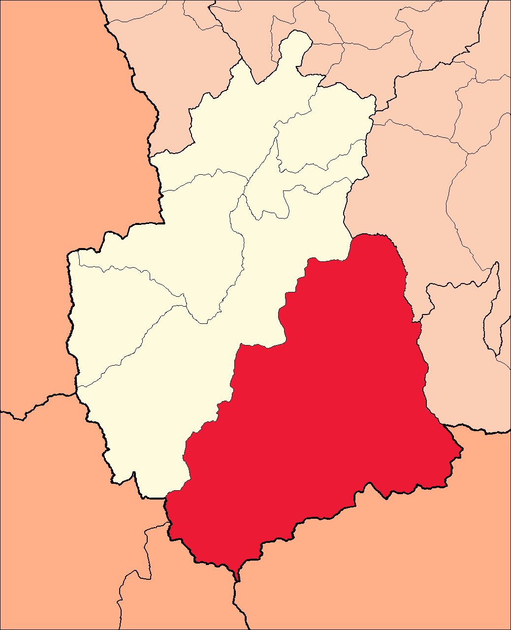 Área del distrito de San Miguel de Cauri dentro de la provincia de Lauricocha.